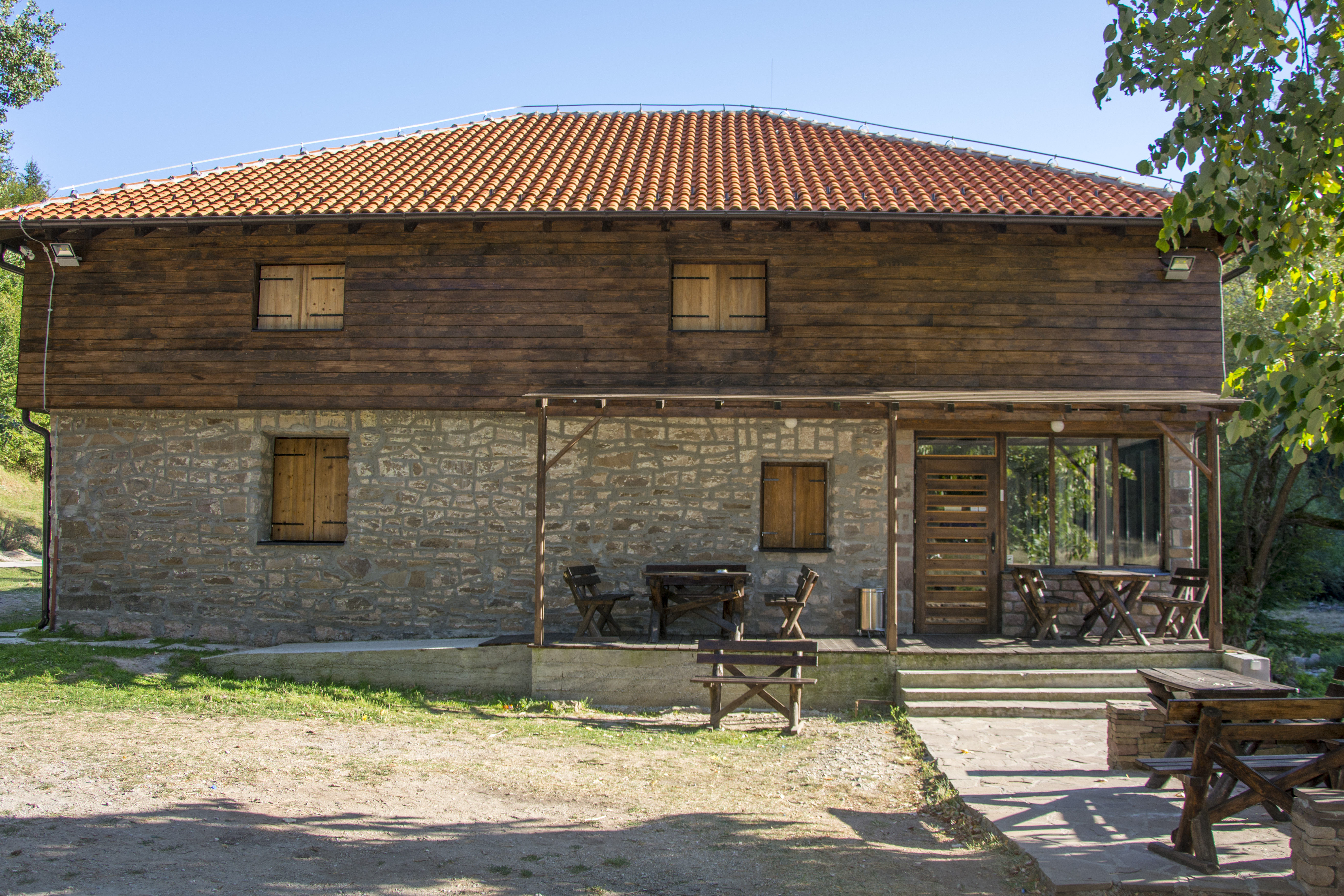 Планинарски дом у Дојкинцима